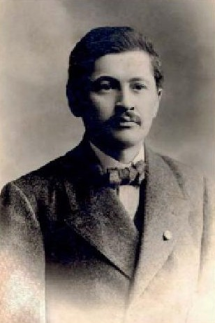 Celestýn Matějů (1880-1959), český akademický malíř